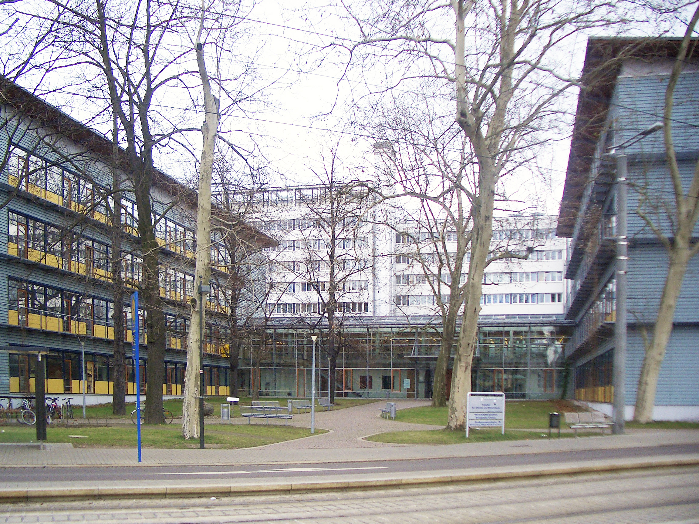 Frontansicht der Fakultät für Chemie und Mineralogie der Universität Leipzig.